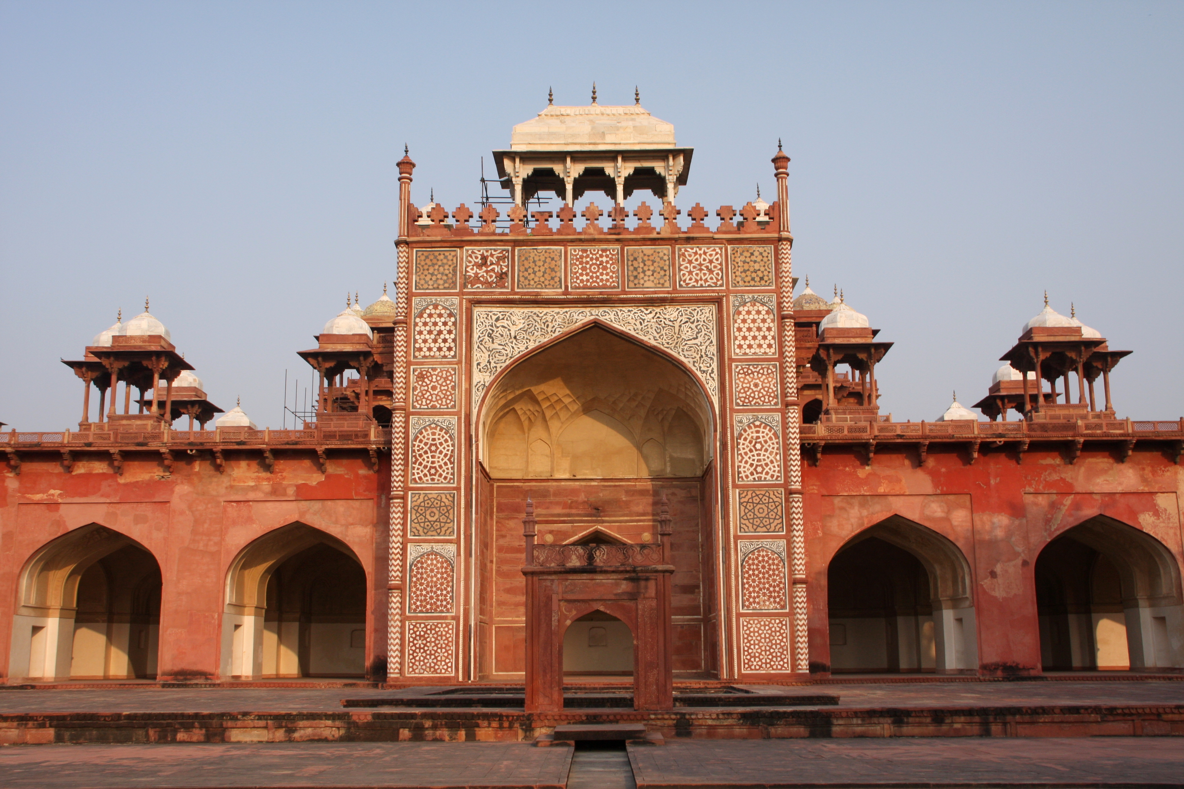 Details of an iwan at Akbar's tomb, Sikandra.